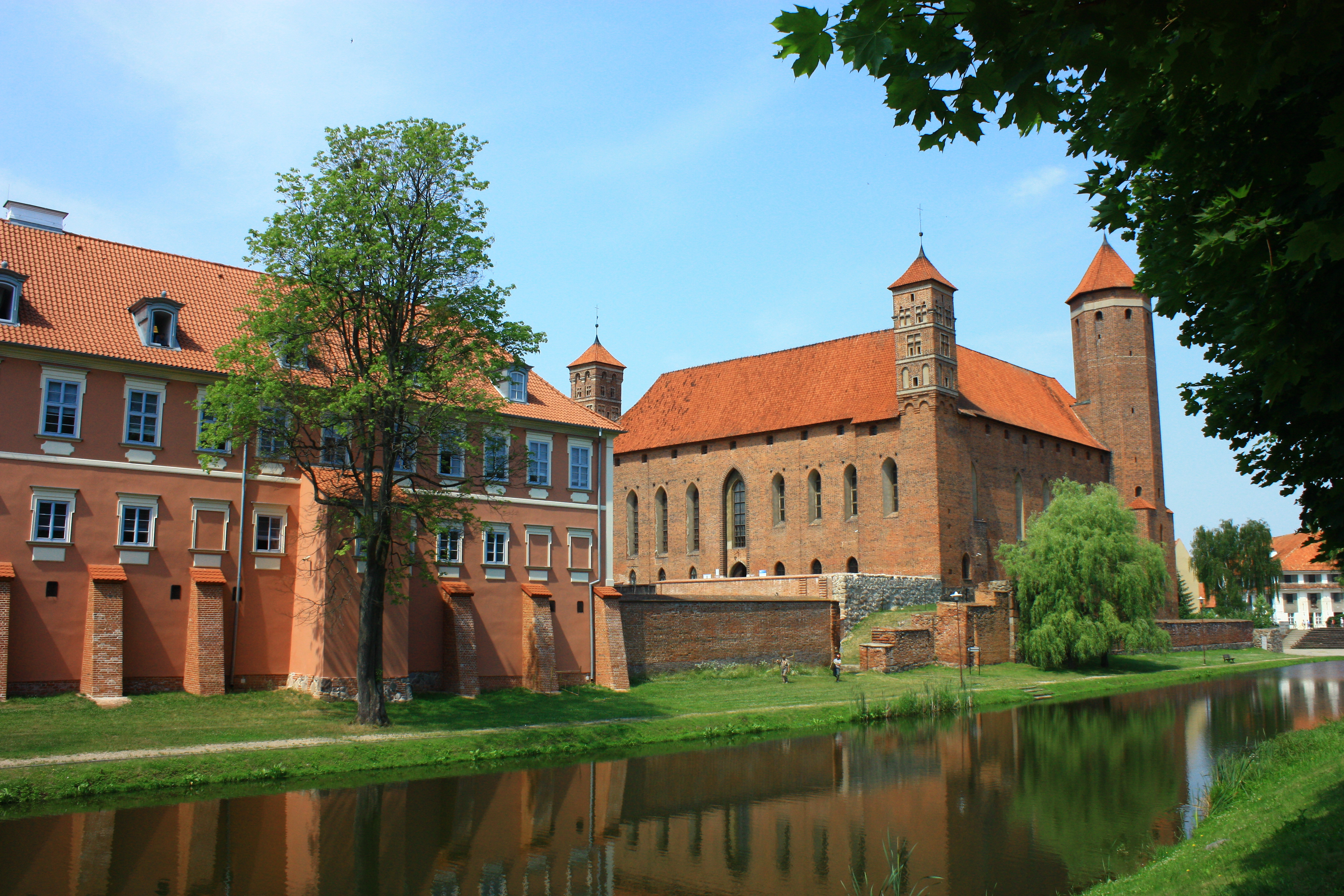 Lidzbark Warmiński, zespół zamku biskupiego, XIV, XIX